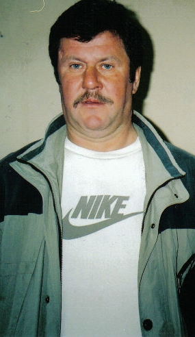 Mieczysław Młynarski